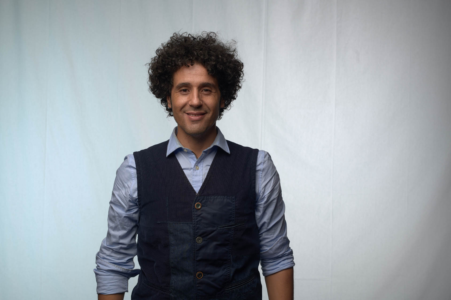 Miguel de Lucas, ilusionista español